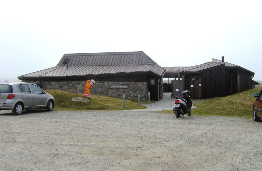 Friluftshuset Orre, Rogaland Norway